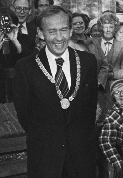 Prinses Beatrix onthult het beeld; burgemeester Ritsema (l) ziet toe